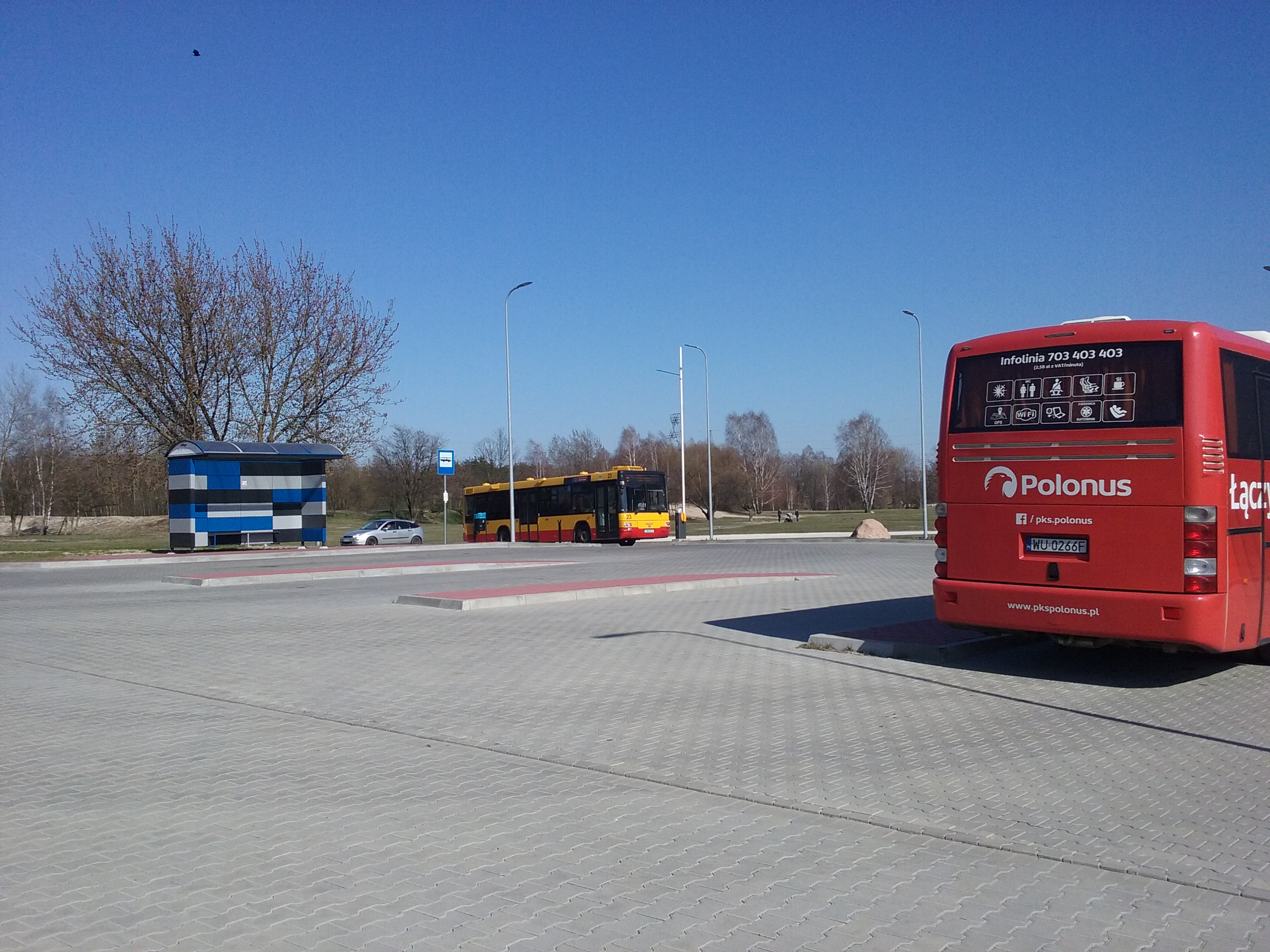 Tomaszów Maz. Przystanek komunikacji miejskiej i dalekobieżnej pod Areną Lodową. W 2019 roku obiekt zyskał bezpośrednie połączenia autobusowe z Warszawą